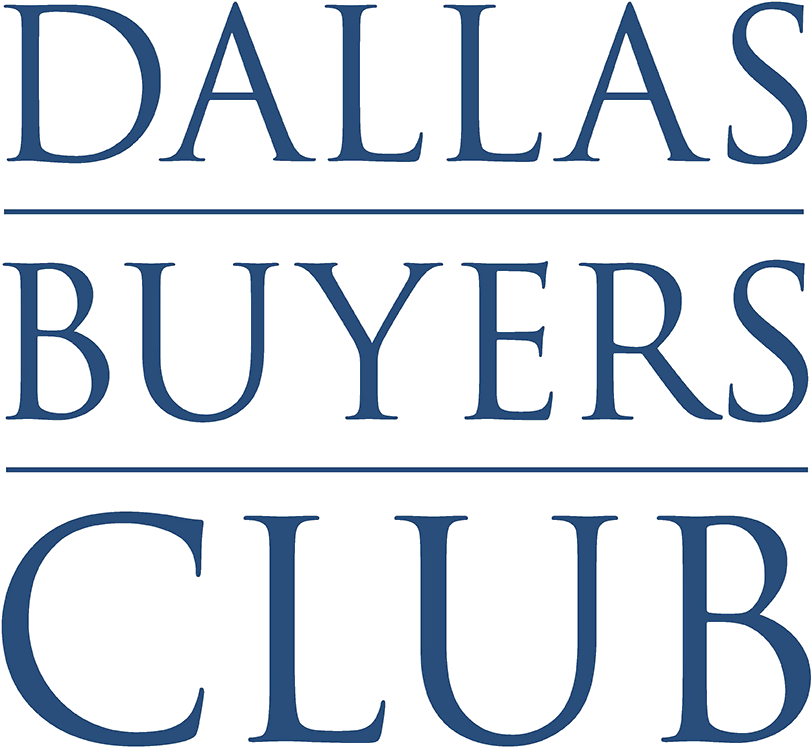 Logo of the "Dallas Buyers Club".